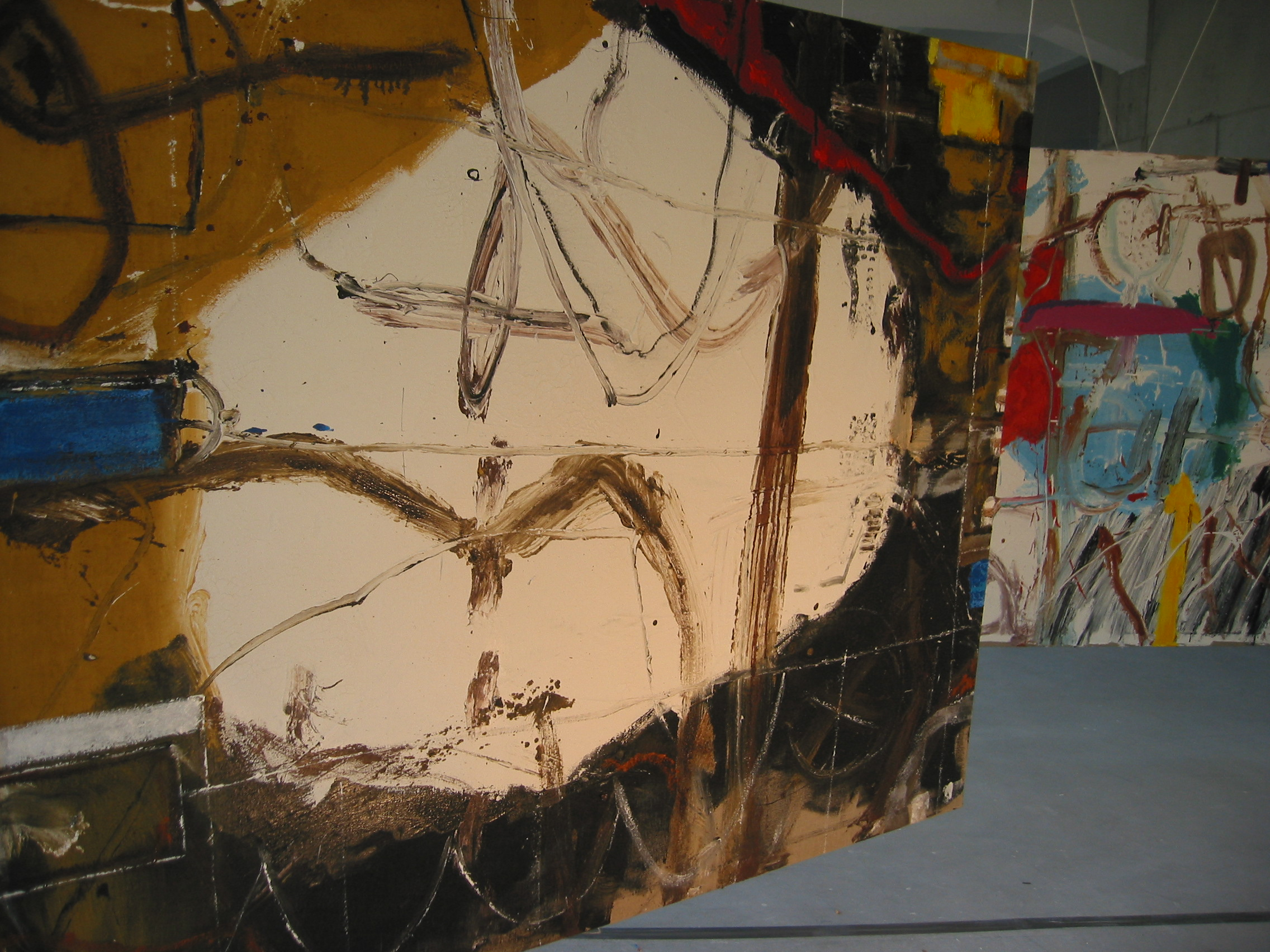 eins von Beat Toniolos Materialbildern